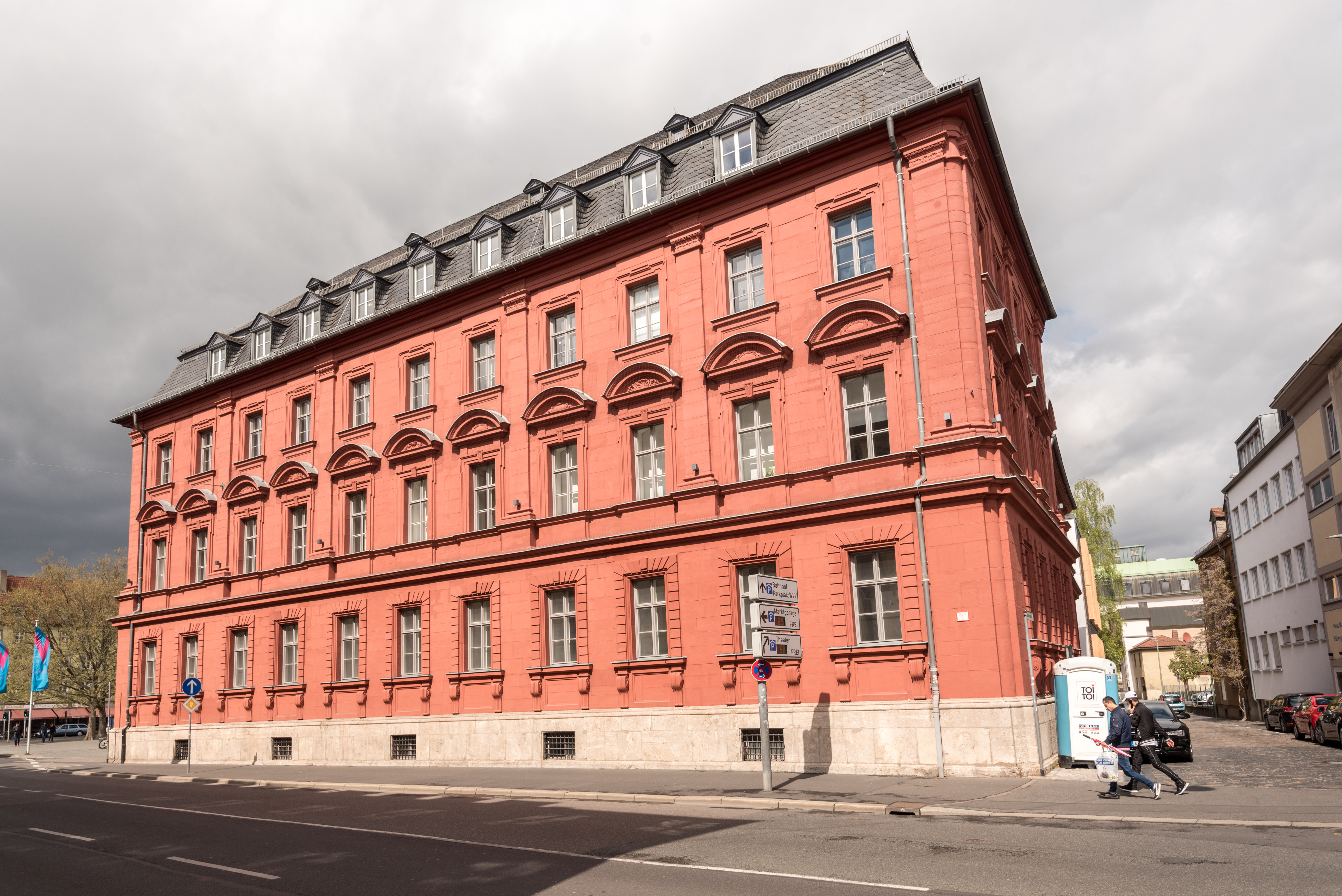 Würzburg, Theaterstraße 23, Greiffenclau-Palais